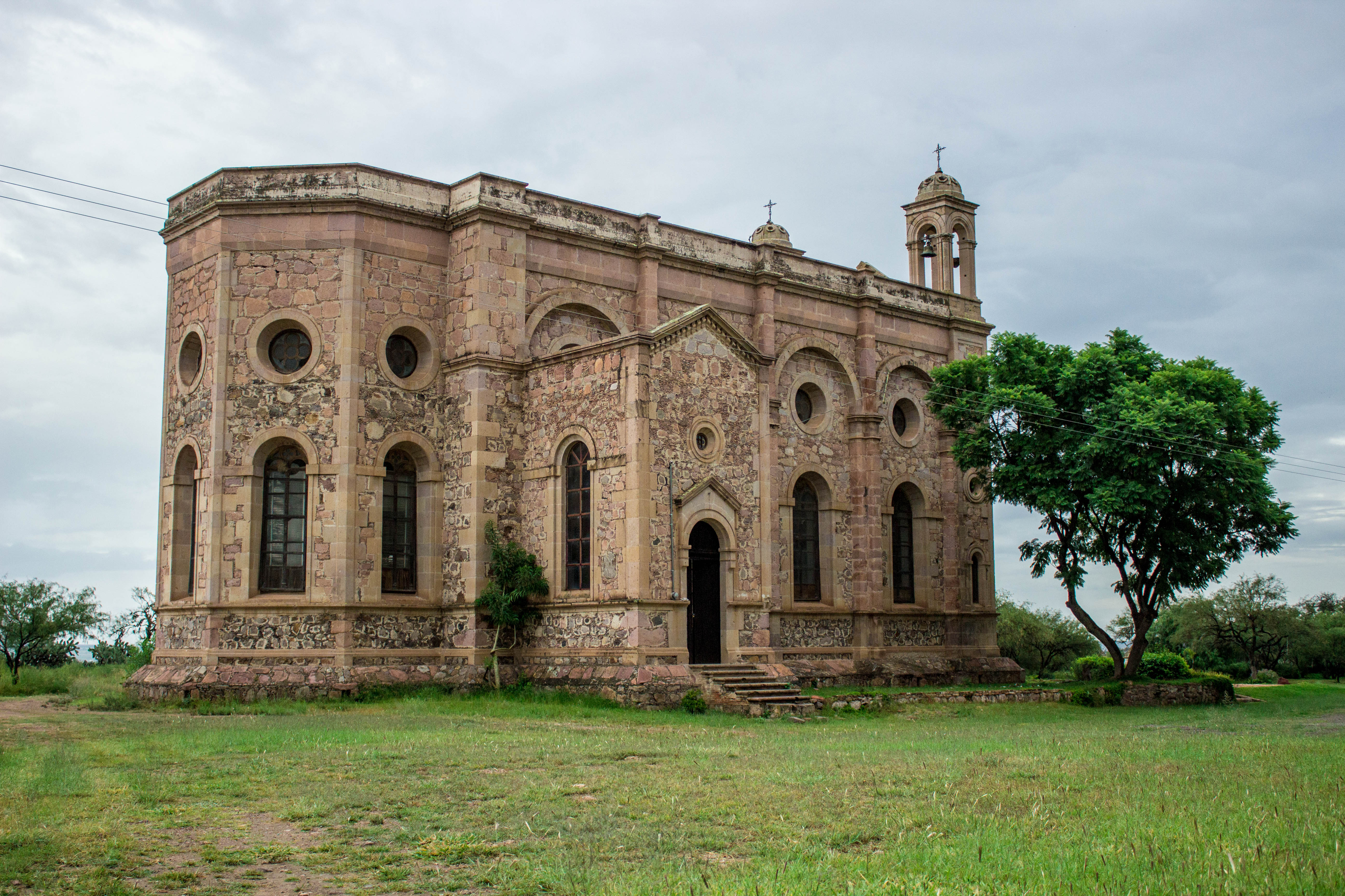 Templo de San Isidro Labrador